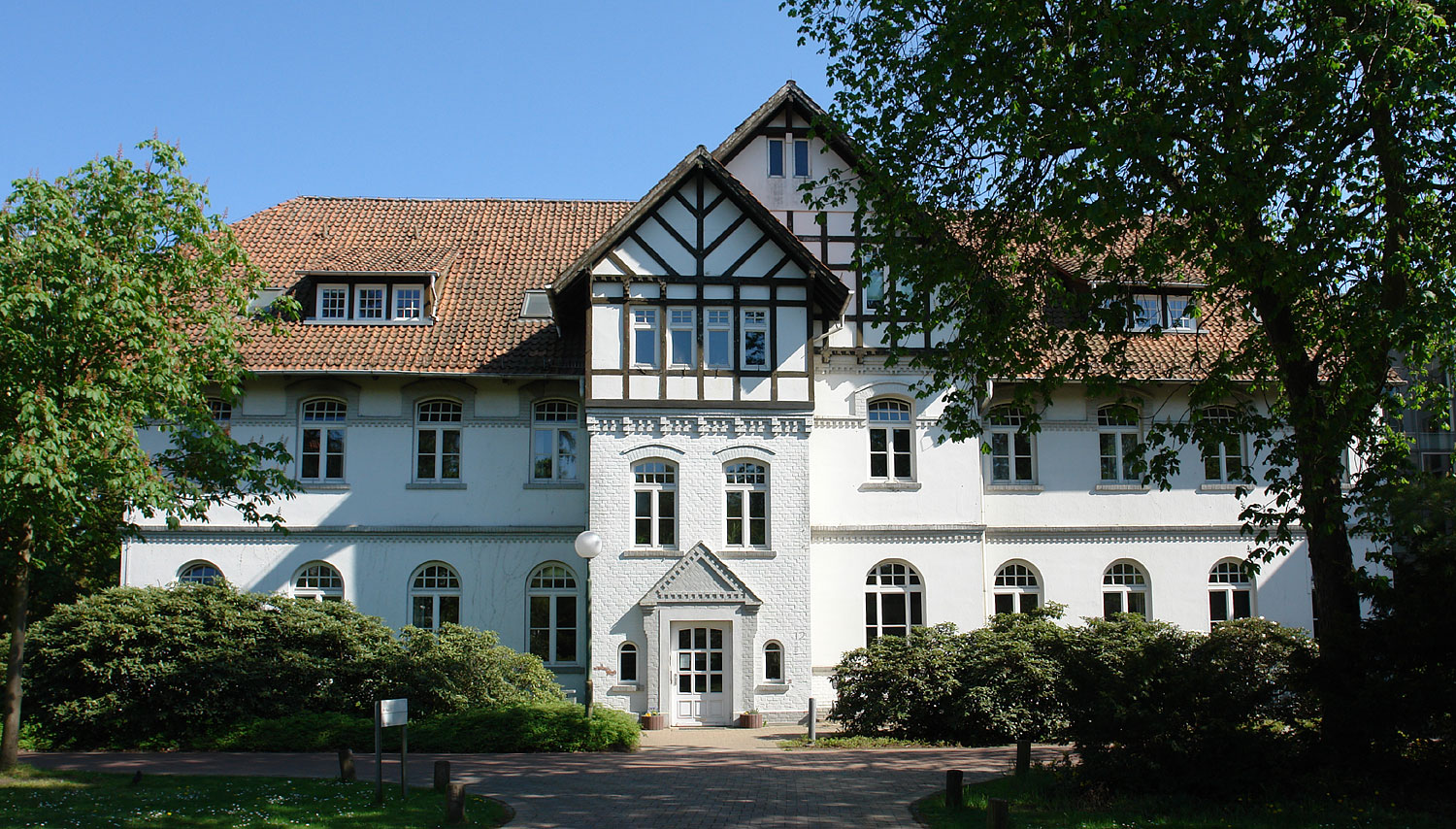 Klinikum Bremen-Ost, Haus 12. Ehemals St. Jürgen Asyl, Haus II. Herstellung 1900–1904. Funktion: Pflege-Station für Männer Das abgebildete Objekt ist ein geschütztes Kulturdenkmal in der Freien Hansestadt Bremen, mit der Nr. 1658 beim Landesamt für Denkmalpflege registriert.